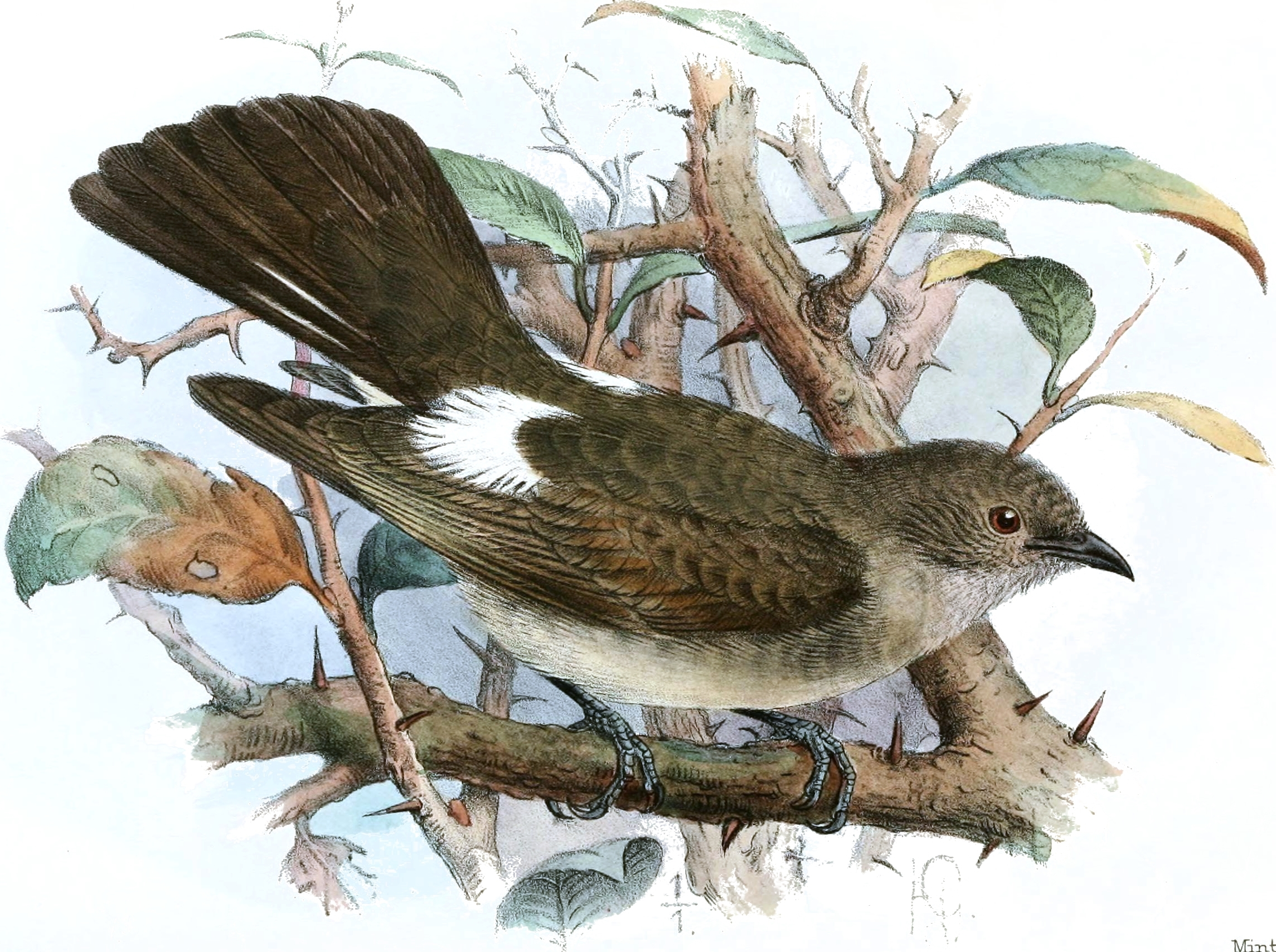 Prodotiscus peasei (s Ethiopia) = Prodotiscus regulus subsp. regulus Sundevall, 1850